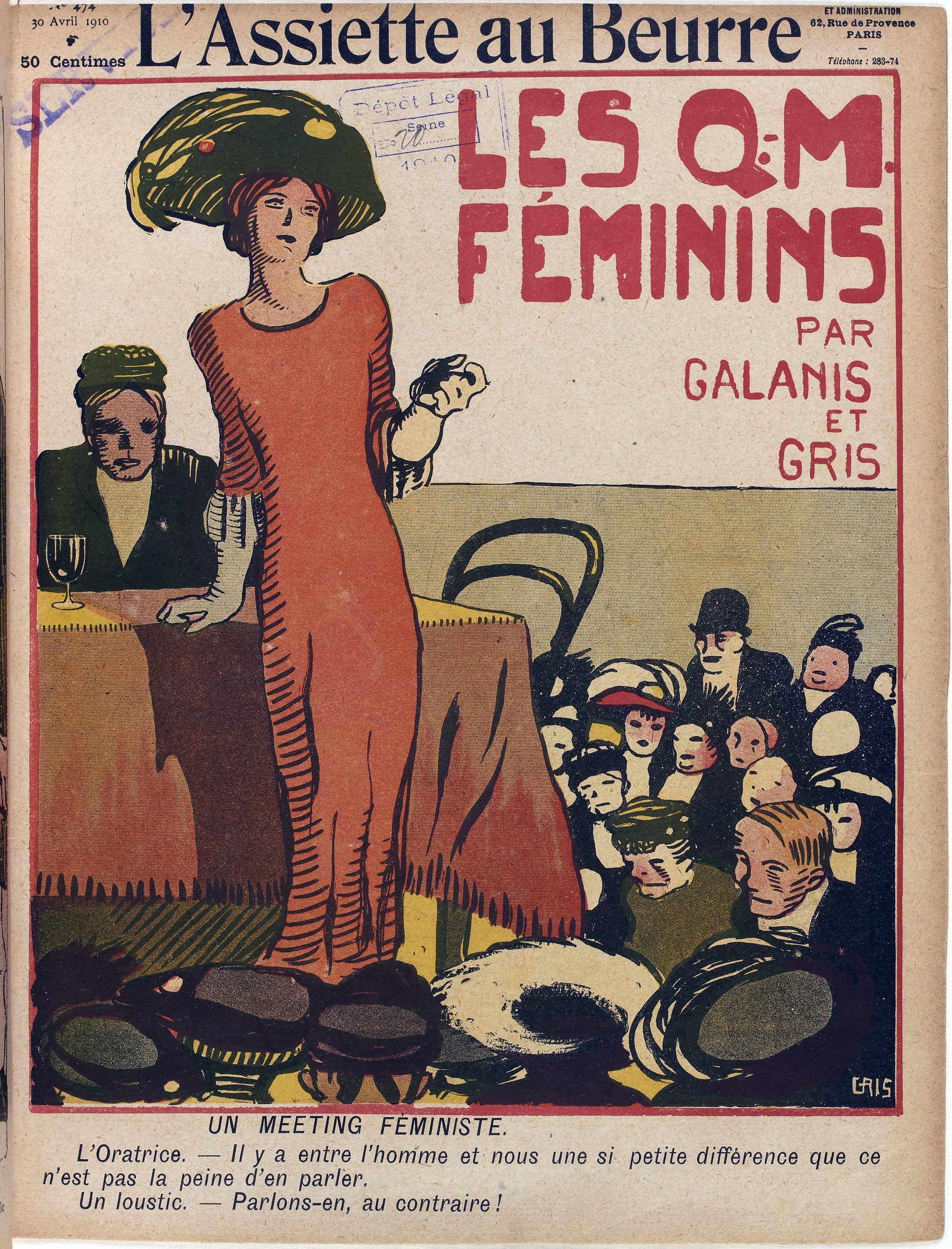 Cover.